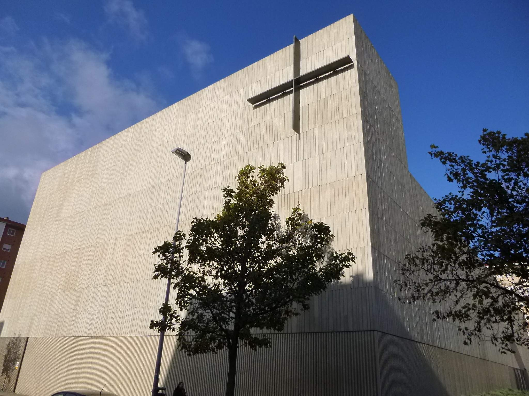 Iglesia de San Jorge (Pamplona)